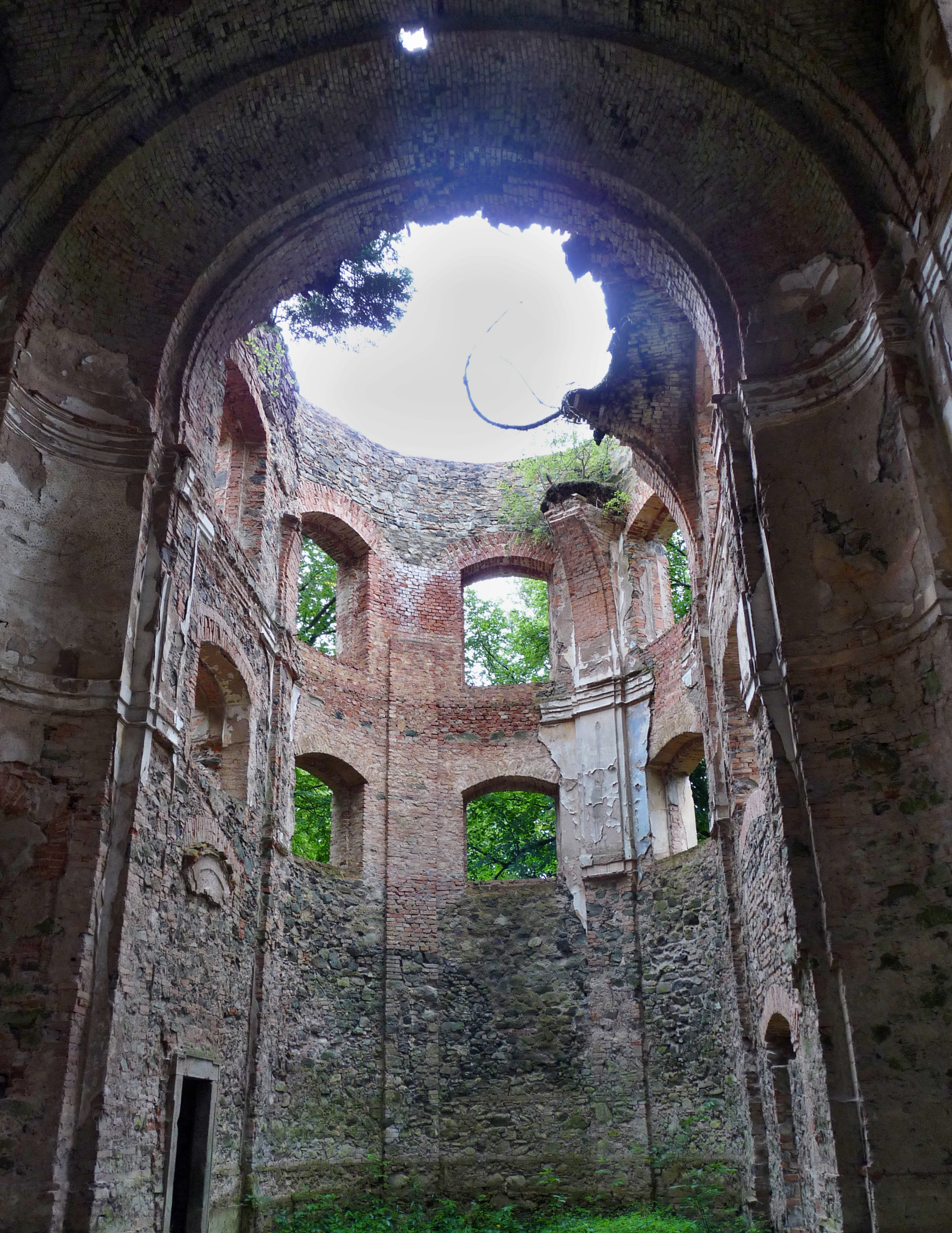 Kostel Nanebevzetí Panny Marie, Svatobor (obec).